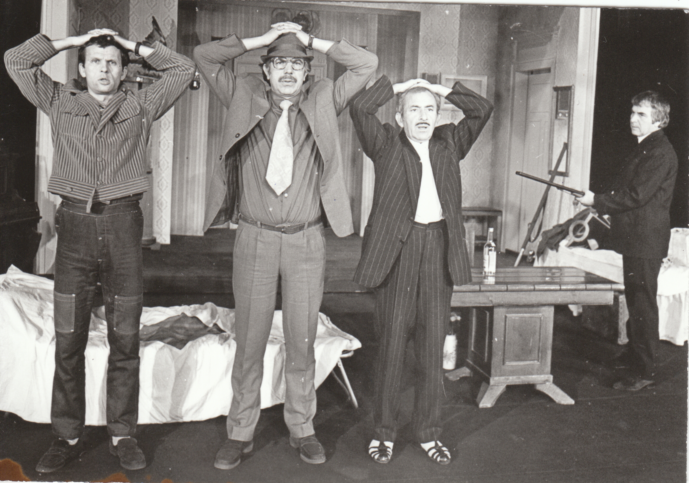 „Феномени“ - режисьор Слави Шкаров отляво-надясно: Владимир Братанов (Михаил Прохоров), Климент Михайлов (Евгений Иванов), Минко Минков (Сергей Клягин), Трайко Начев (Олег Ларичев)